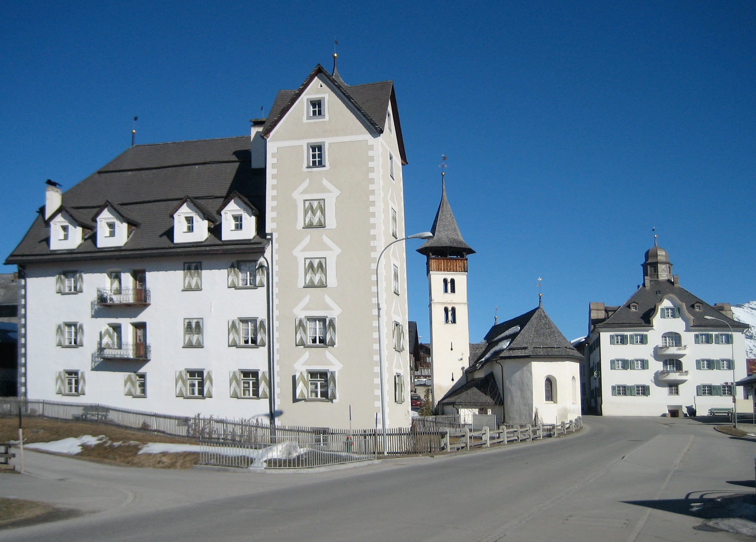 Vella